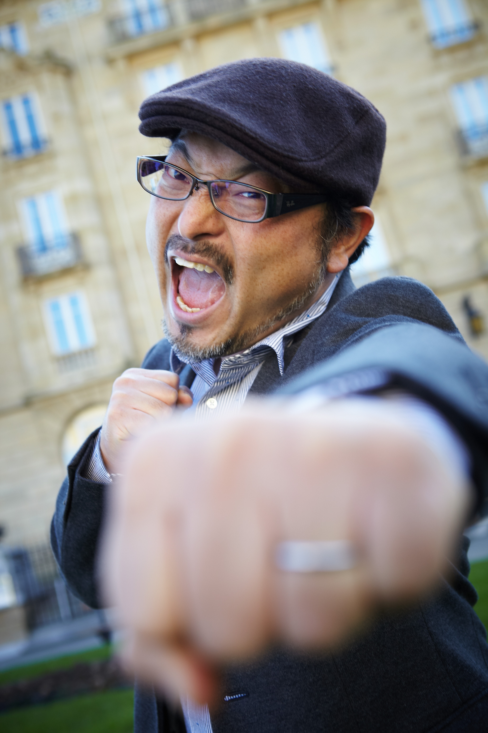 Argazkia / Fotografía: Floro Azqueta